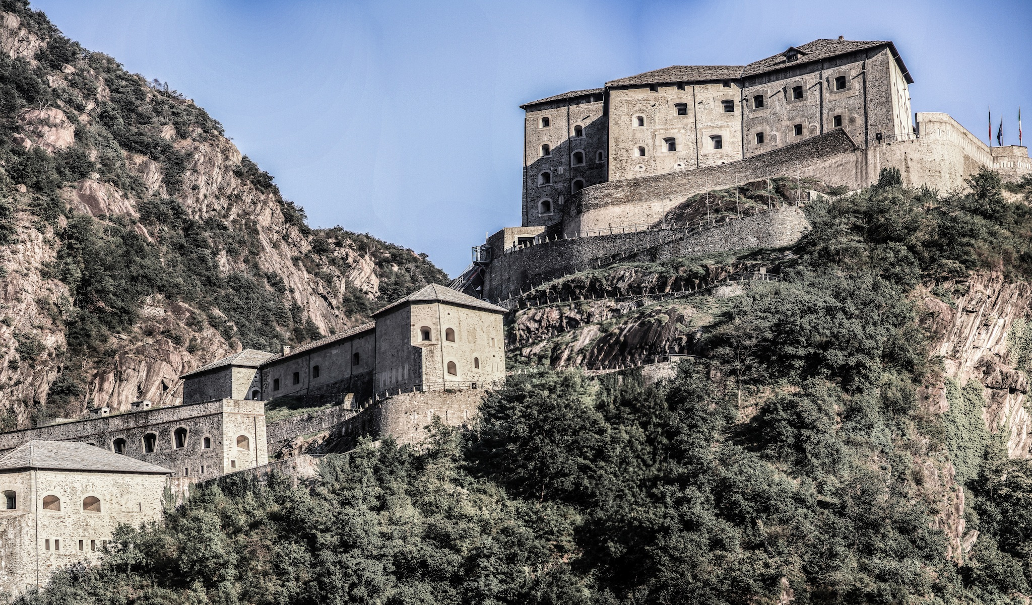 Forte di Bard This is a photo of a monument which is part of cultural heritage of Italy.